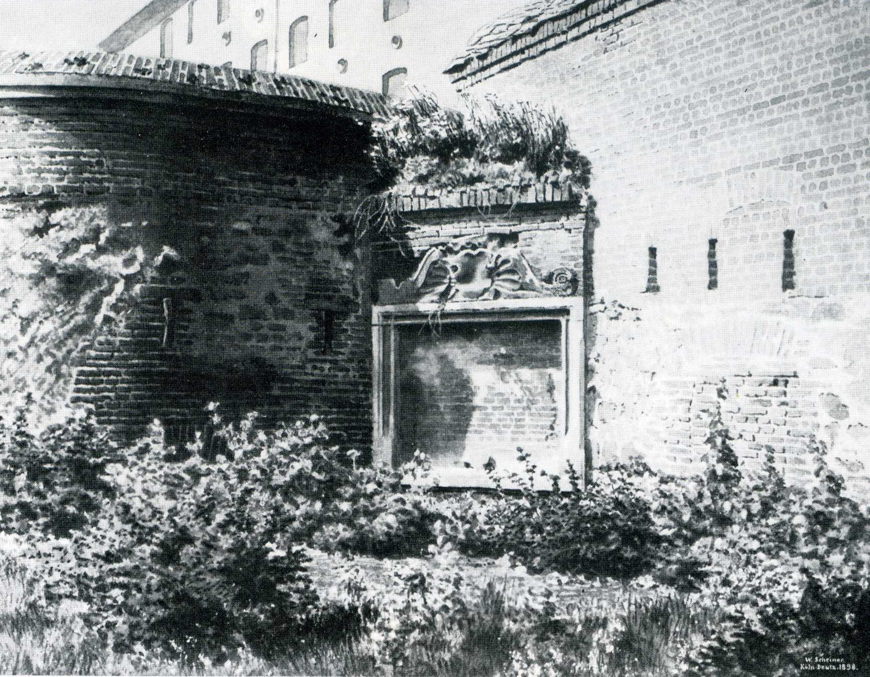 Köln 1898 "Am alten Ufer". Aquarell Wihelm Scheiner Köln Deutz, 1898 (Bezeichnet unten rechts). Stadtmauerrest an St. Kunibert mit vermauerten Spoliem (Teilstücke einer Renaissancerahmung).